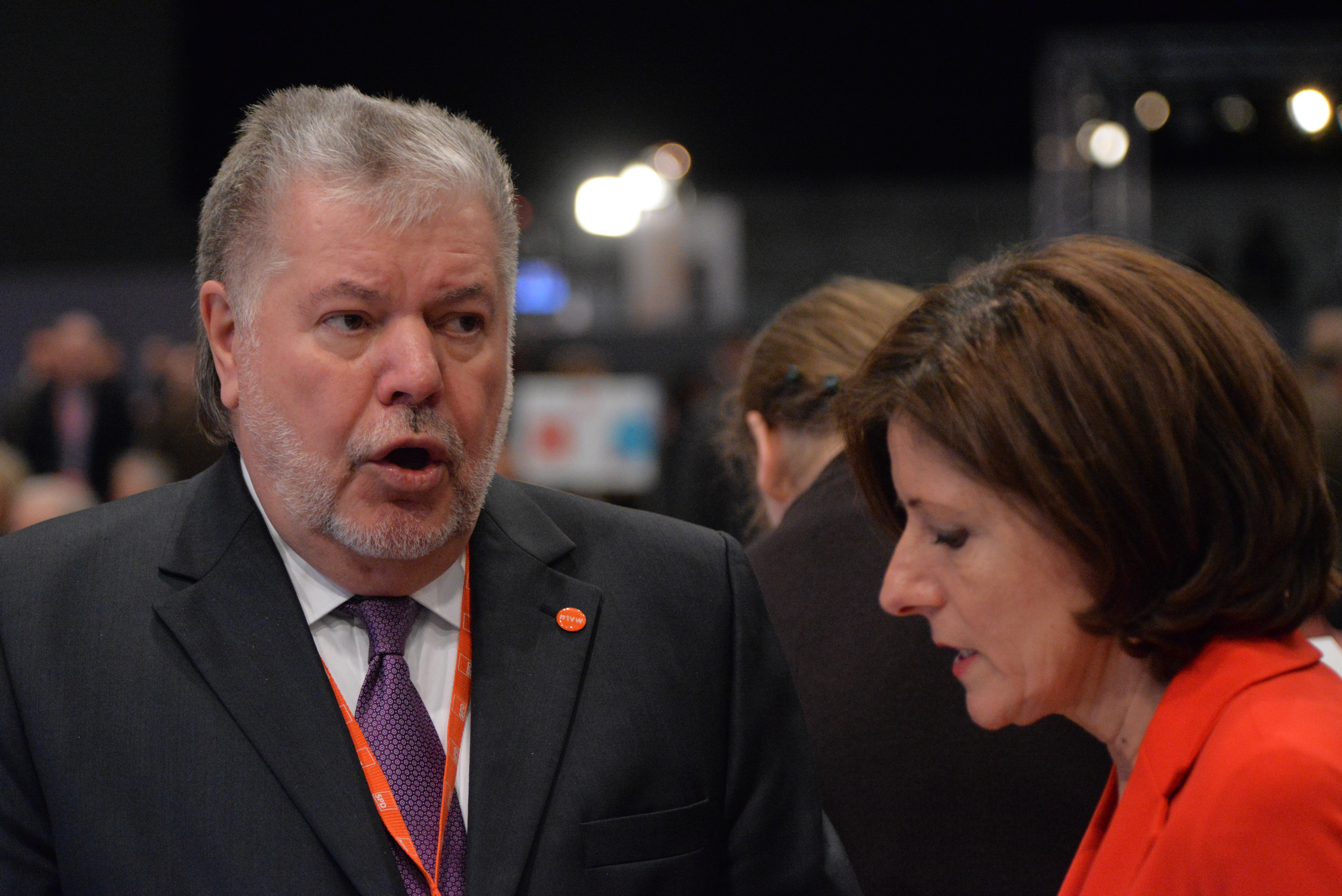 SPD Bundesparteitag Berlin, 10.-12. Dezember 2015, CityCube, Messe Berlin